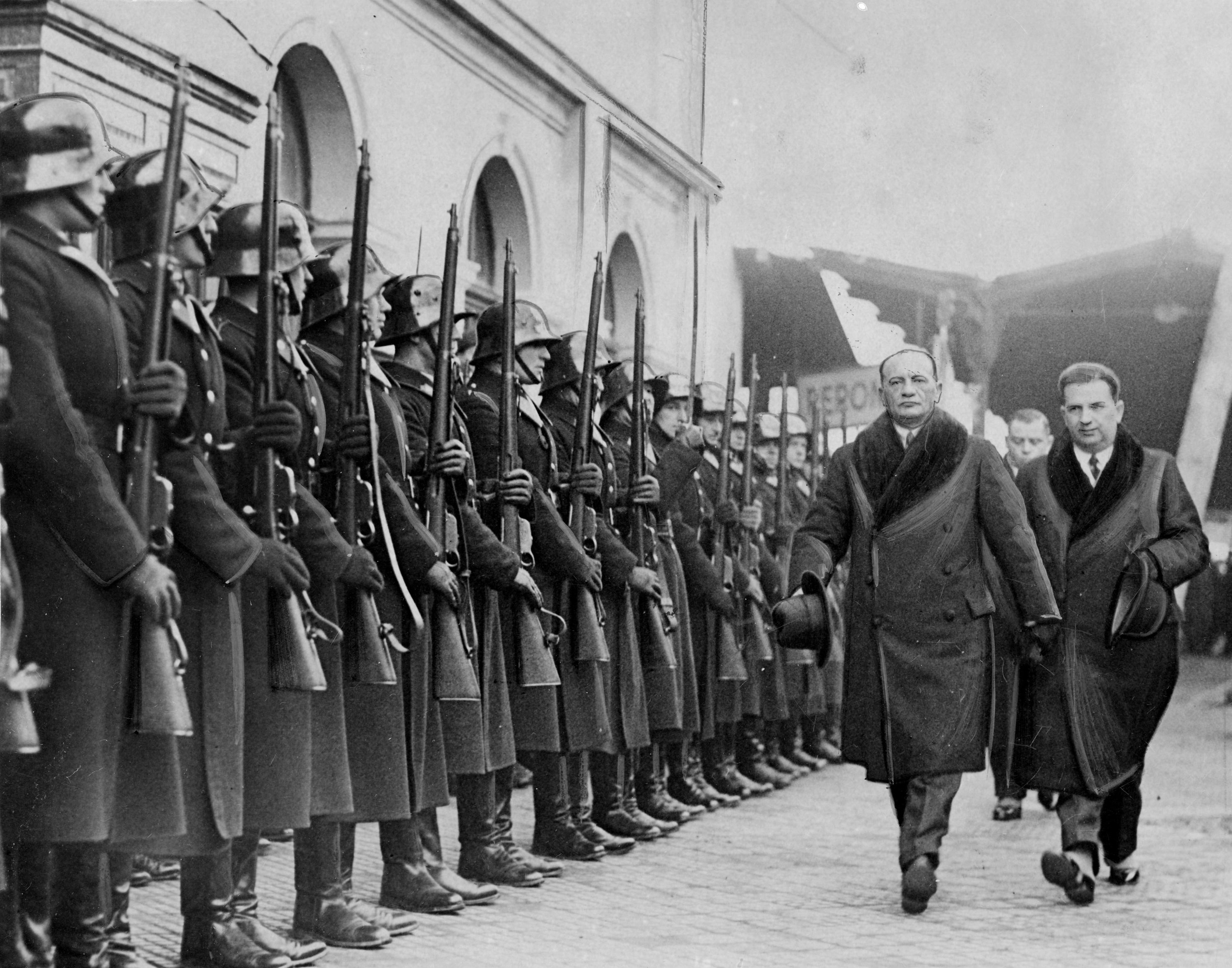 Voivode Kazimierz Świtalski in Kraków